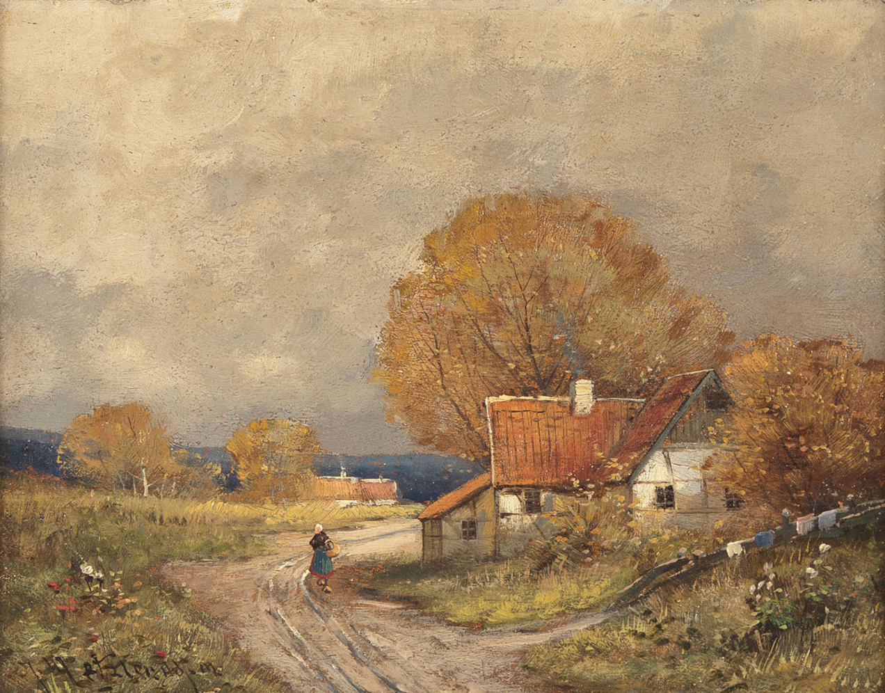 Fachwerkhaus vor Seekulisse, Öl auf Malkarton, 22 cm x 28 cm.